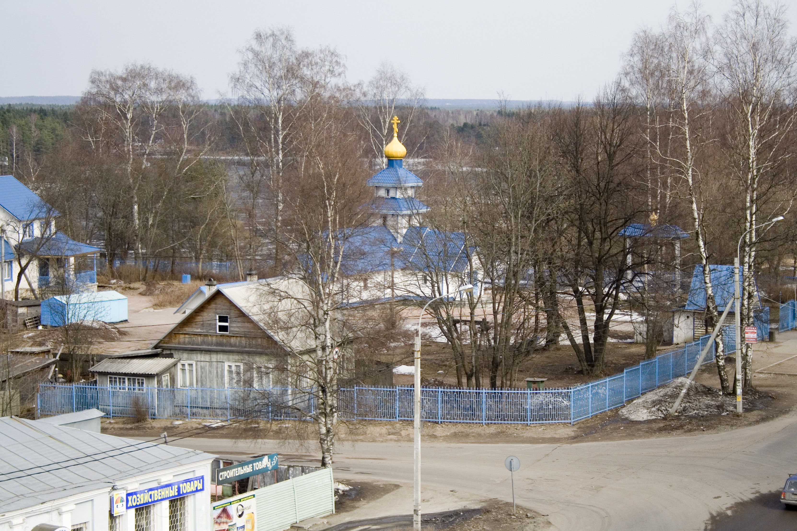 Вид с крыши пятиэтажки (Советская 27) на церковь.